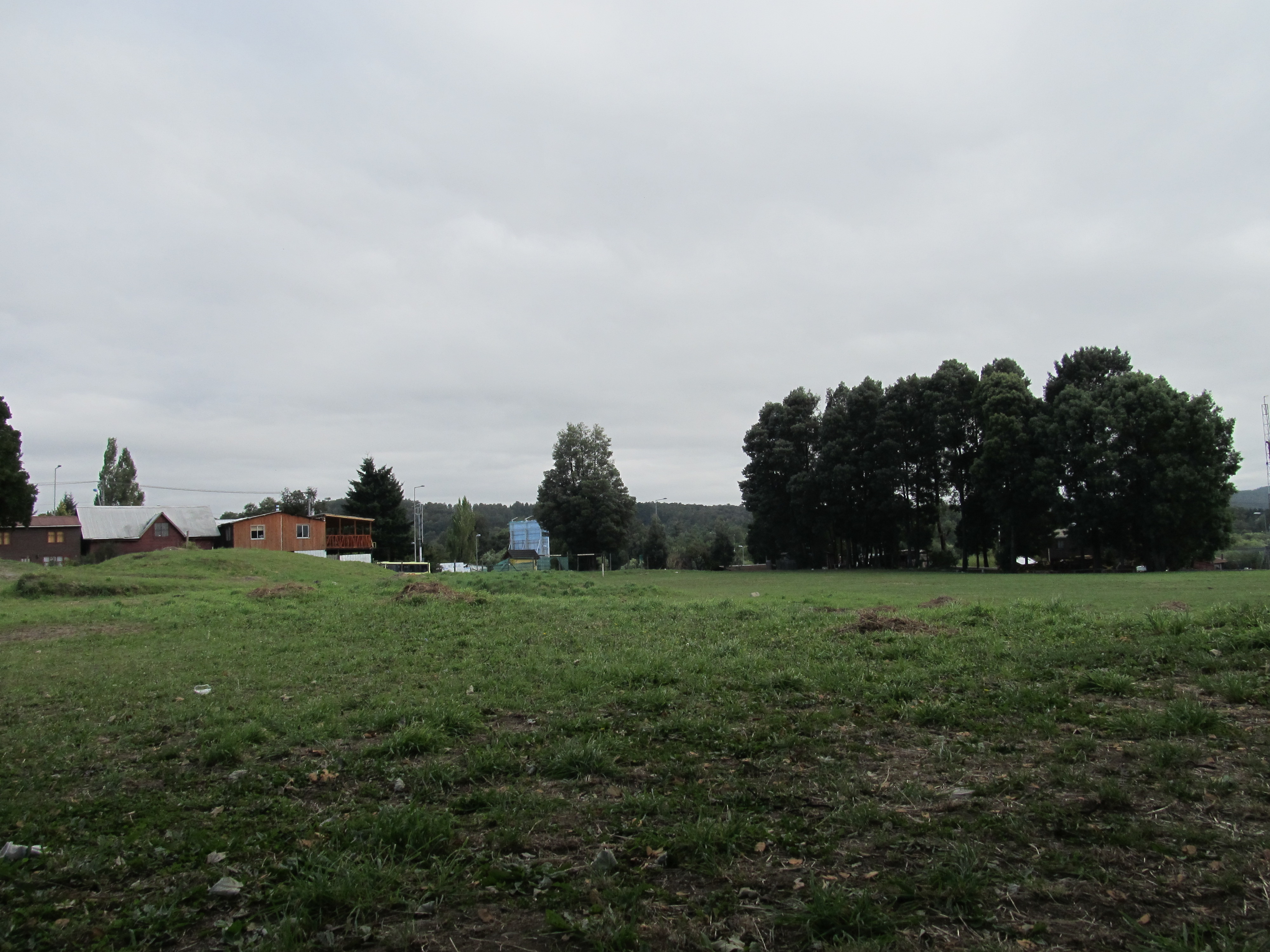 Sitio de Villarrica This is a photo of a national monument in Chile: 697